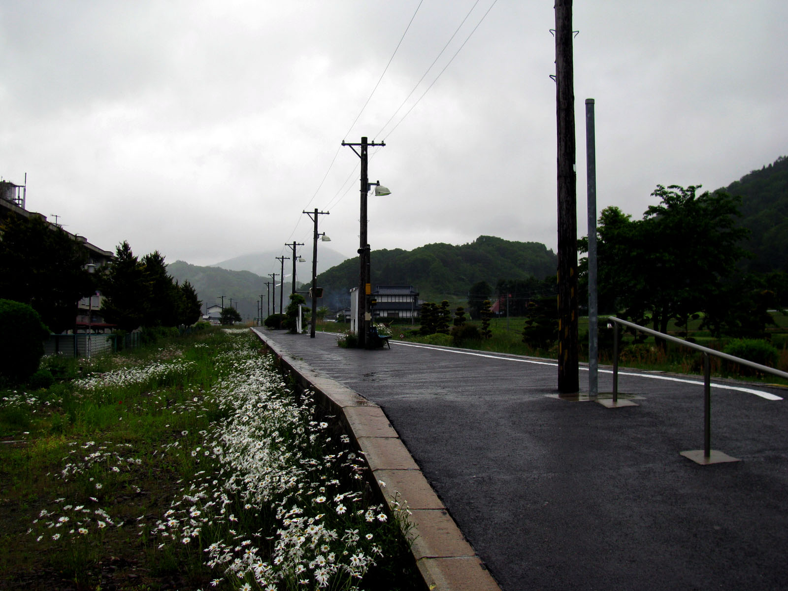 水郡線菅谷駅